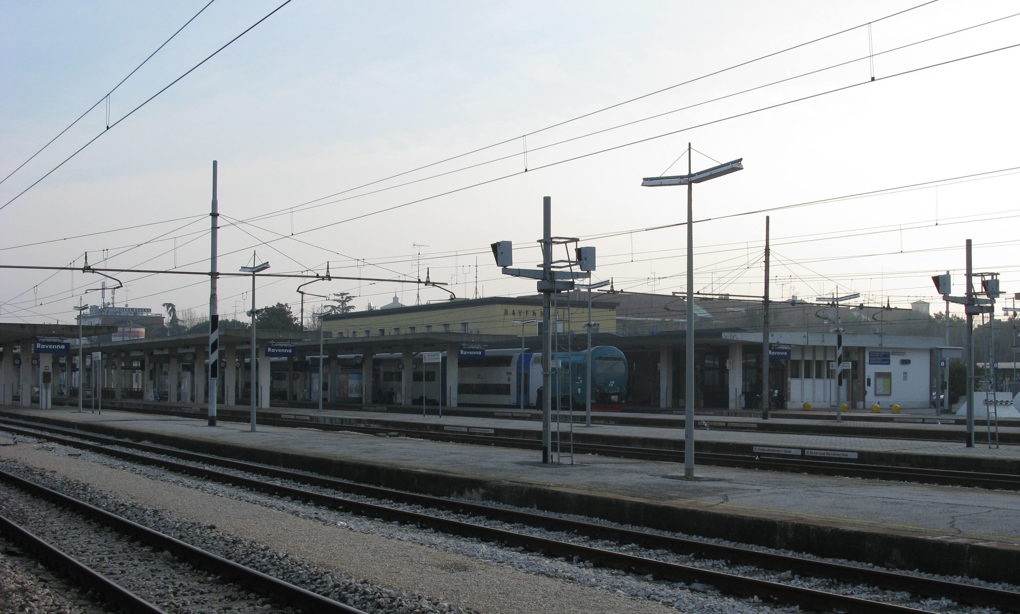 Stazione di Ravenna.